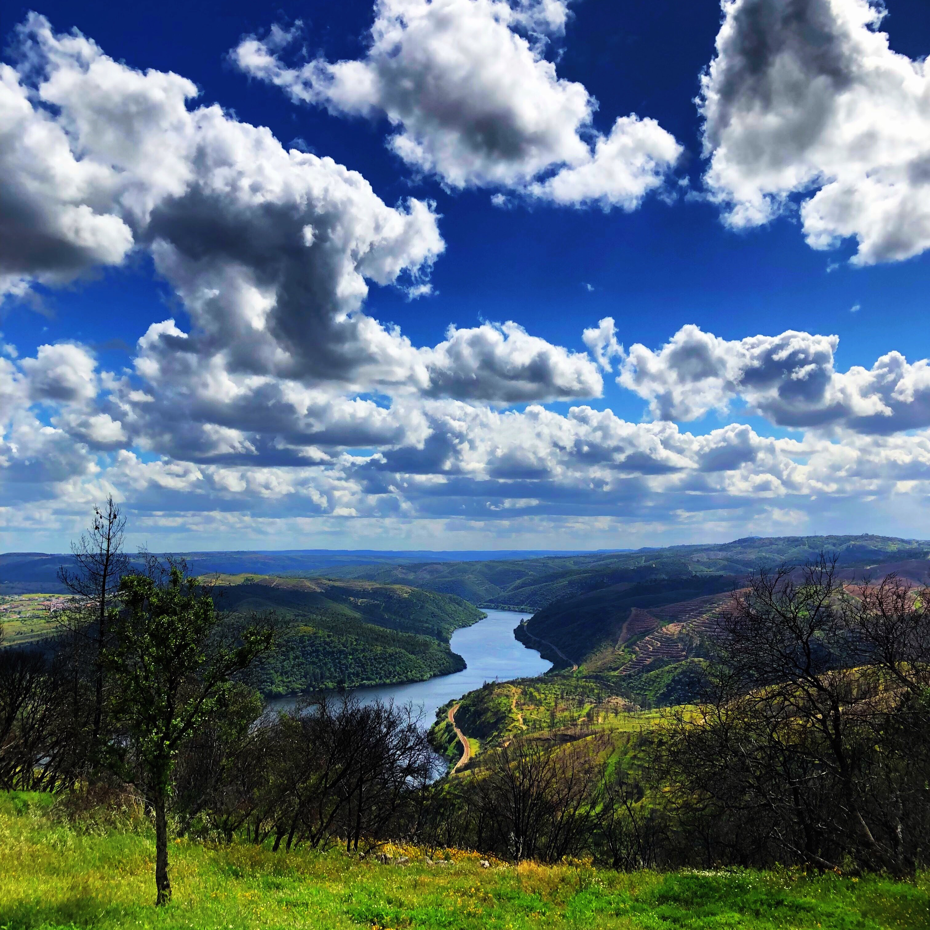 Vila Velha de Rodão perto de Castelo Branco This is a photography of a Site of Community Importance in Portugal with the ID: Monumento Natural Portas de Ródão. Natural Portas de Ródão Natura2000 entry, Natural Portas de Ródão EEA entry